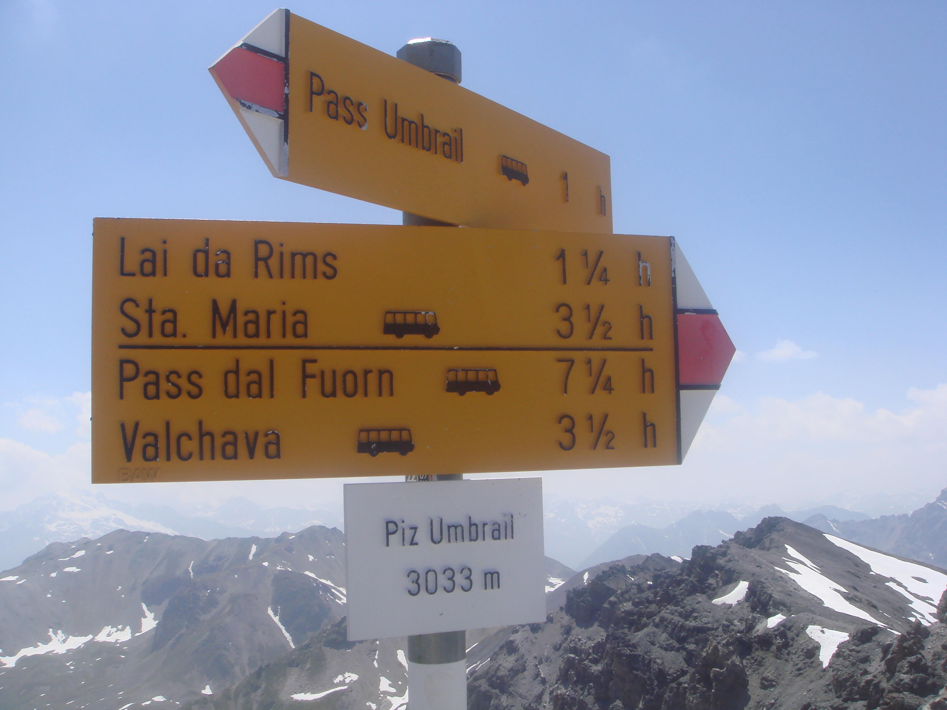 Piz Umbrail, Graubünden, Val Müstair